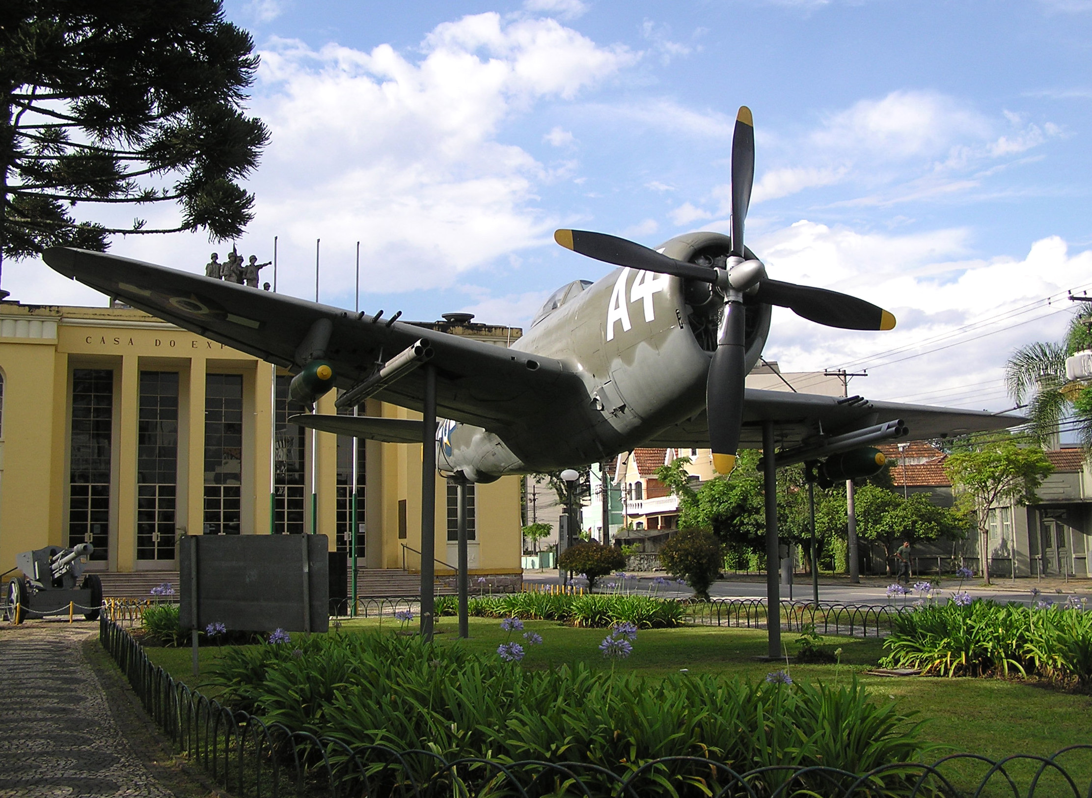 Museu do Expedicionário. P-47D Thunderbolt.